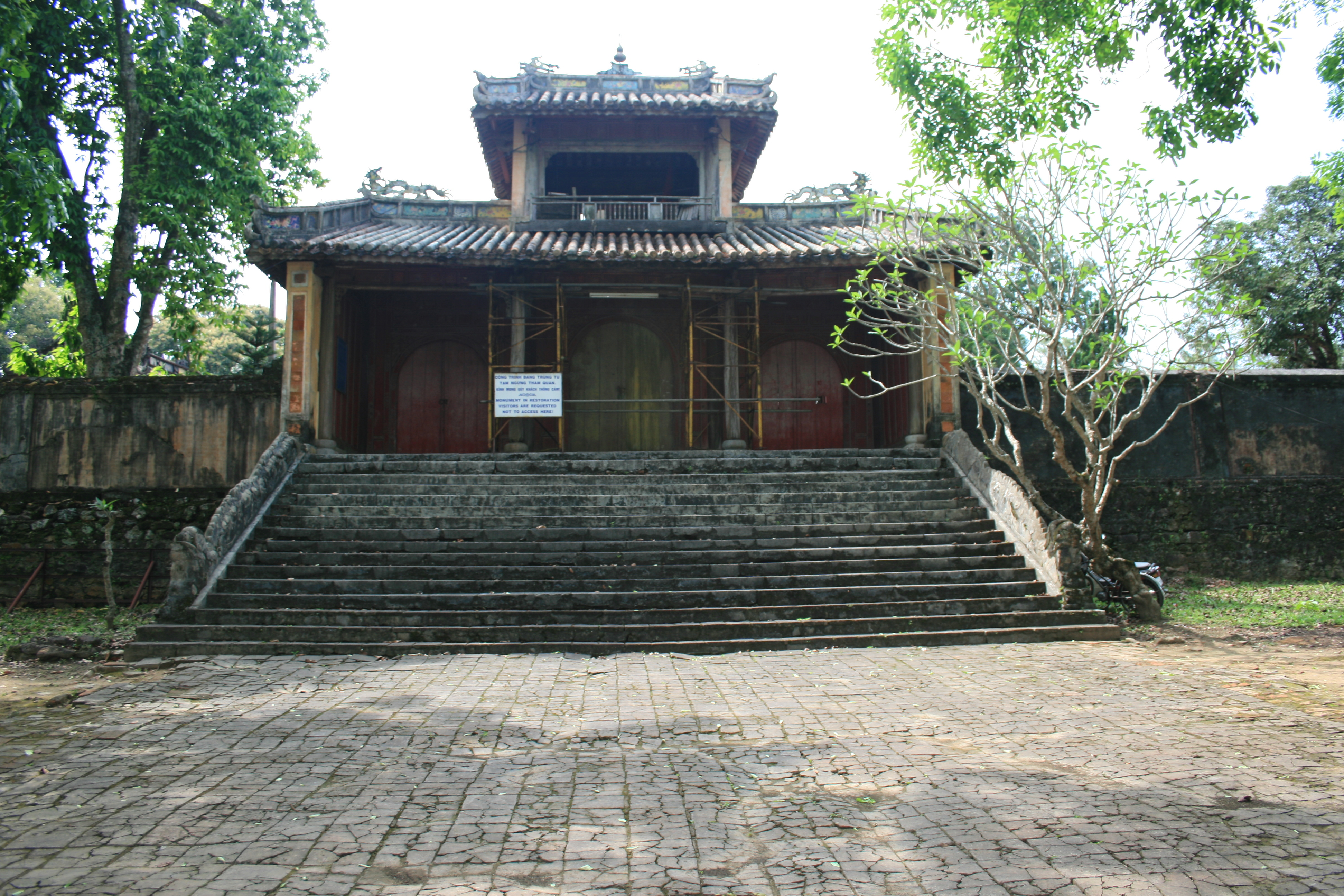 Tomb of DongKhanh (Cổng lăng)